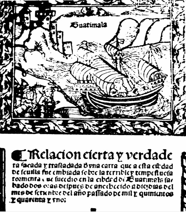 Portada de la descripción de la destrucción de Santiago de los Caballeros en 1541.